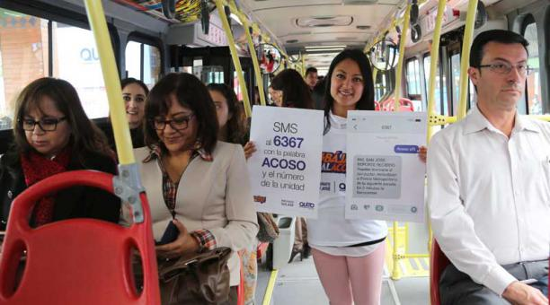 Activación del Programa Bájale al acoso: Activación.